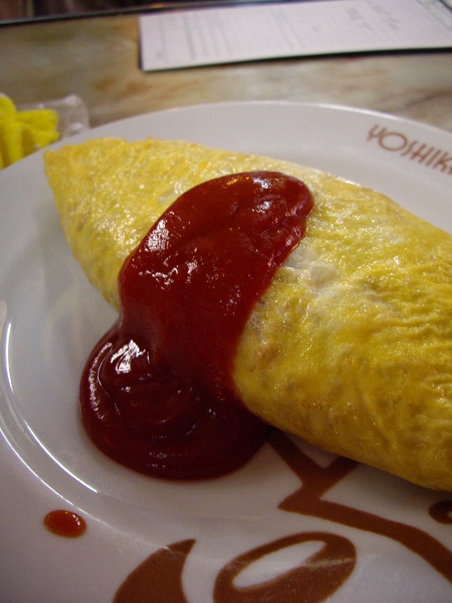 オムライス（東京・台東区浅草1-41-4、浅草駅最寄りの「洋食屋 ヨシカミ」浅草店）